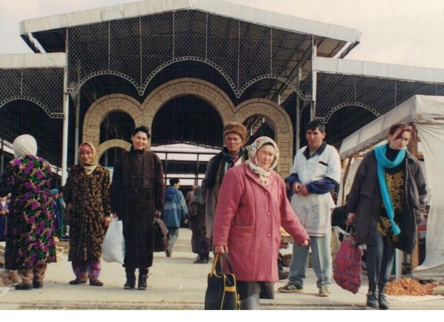 Гузар. Базар. 2000